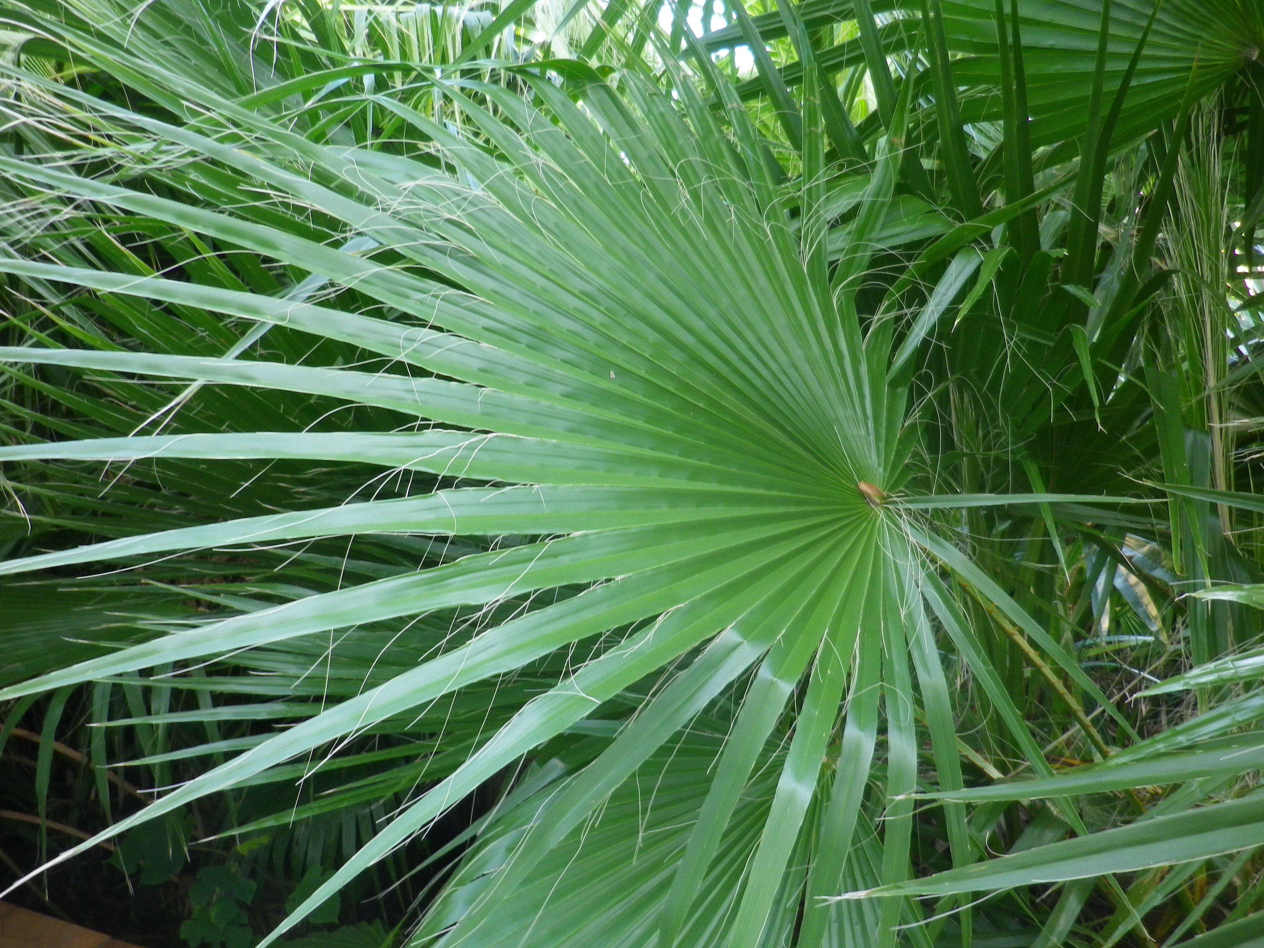 Palme sur un jeune spéciemen